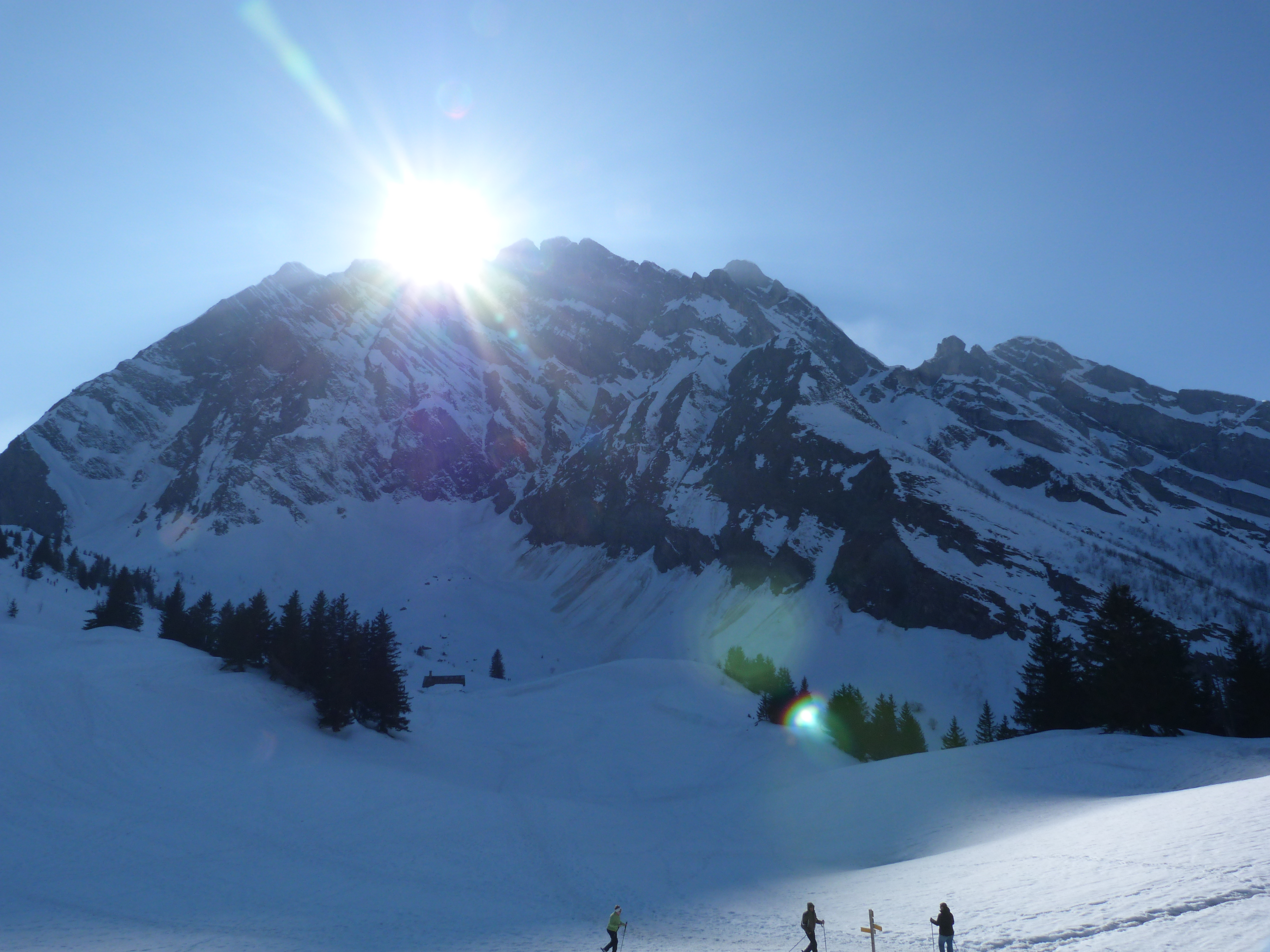 Pointe de Merdassier vue du col des Aravis